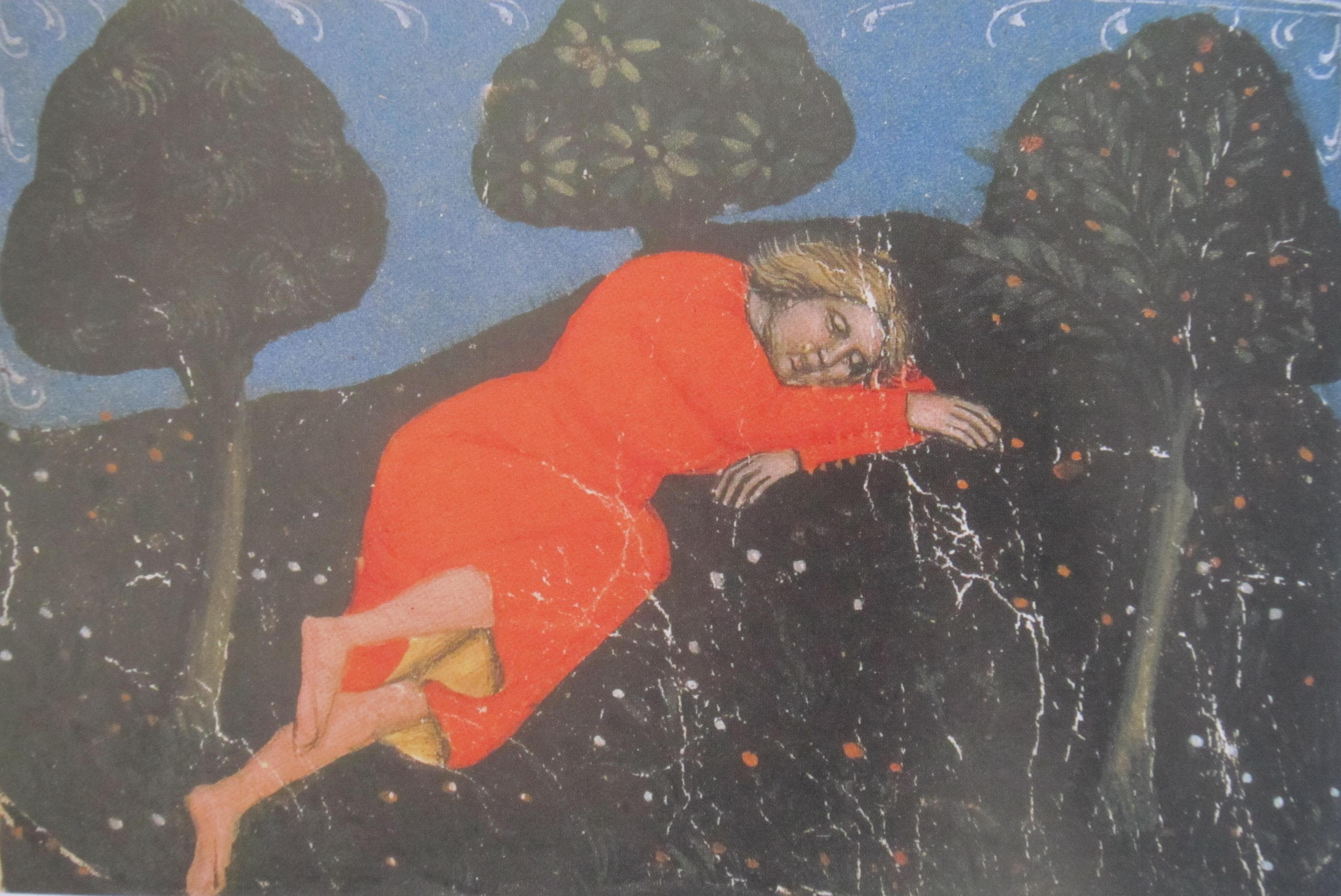 Aprile, da codice miniato del 1385 presso Biblioteca di Forlì